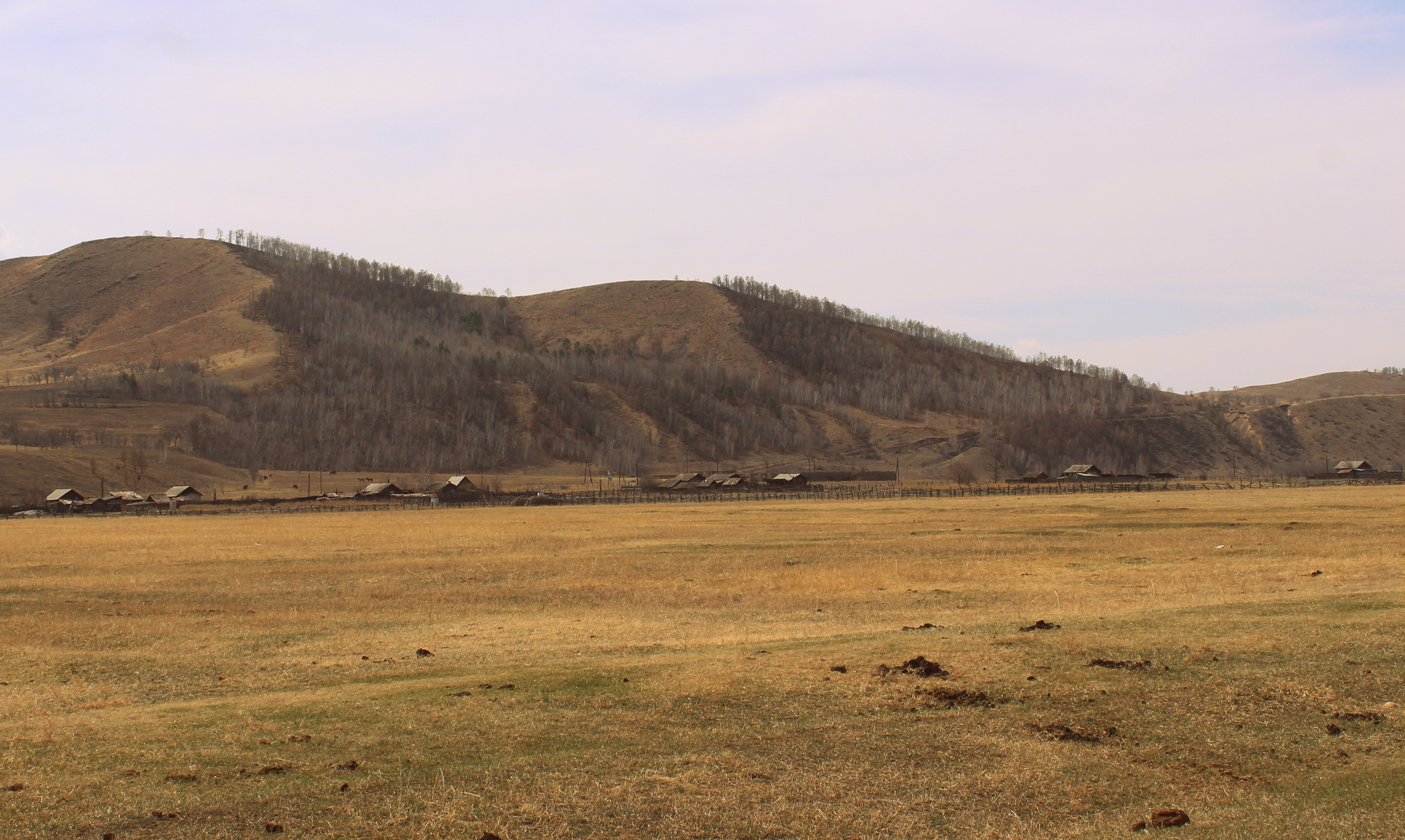 Маленькая деревушка Укыр-Челон в Джидинском районе Бурятии